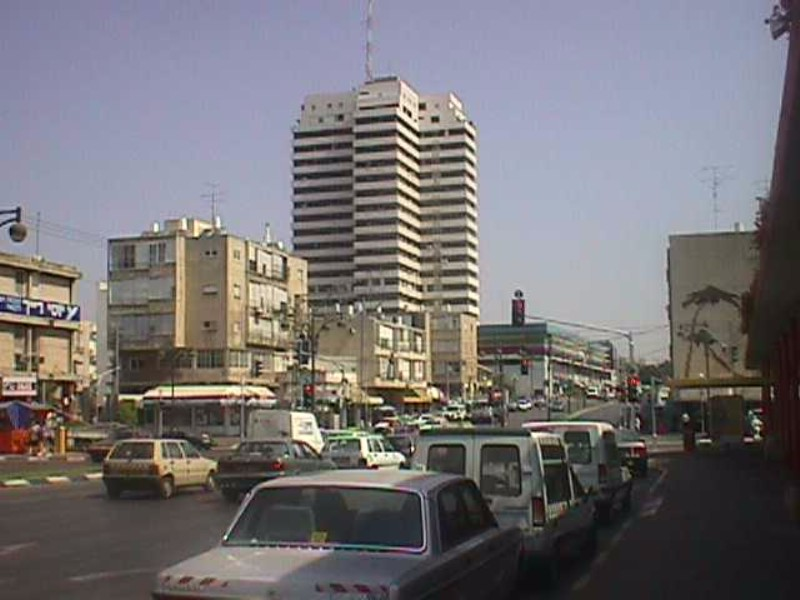 Ben Gurion Avenue in Herzliya (Israel)